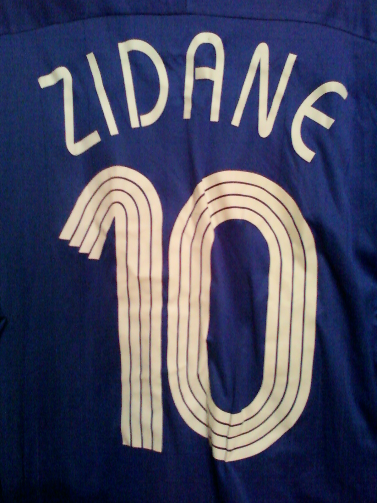 Numéro 10 de Zidane sur le maillot de la Coupe du Monde 2006